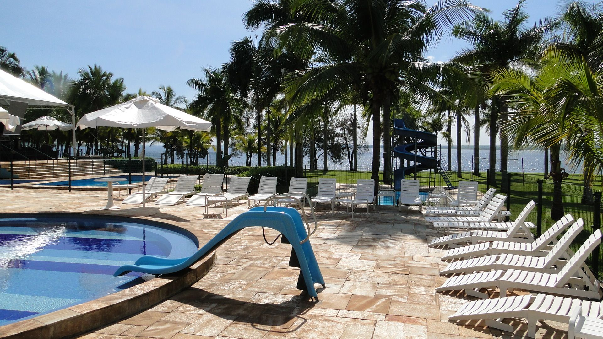 Yacht Clube Aracatuba